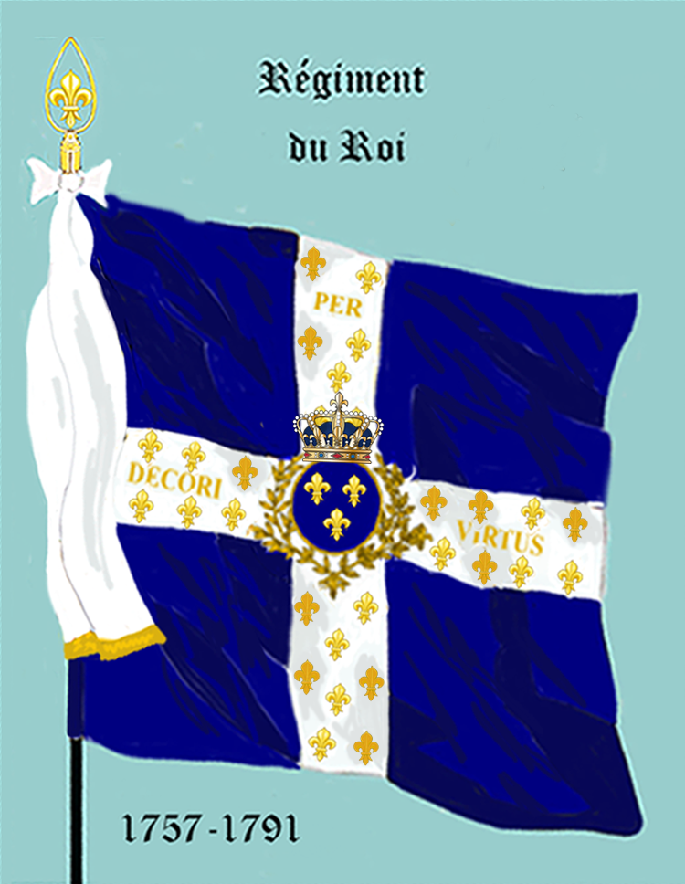 Ordonnanzfahne eines königlich französischen Infanterie-Regiments. - Entnommen und überarbeitet aus: „LES UNIFORMES ET LES DRAPEAUX DE L'ARMÉE DU ROI“ Marseille 1899. (Drapeau d'Ordonnance d' un régiment française d'infanterie royale.)